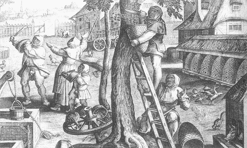 Rural beekeepinglabel QS:Lde,"Bäuerlicher Bienenstand"label QS:Len,"Rural beekeeping"